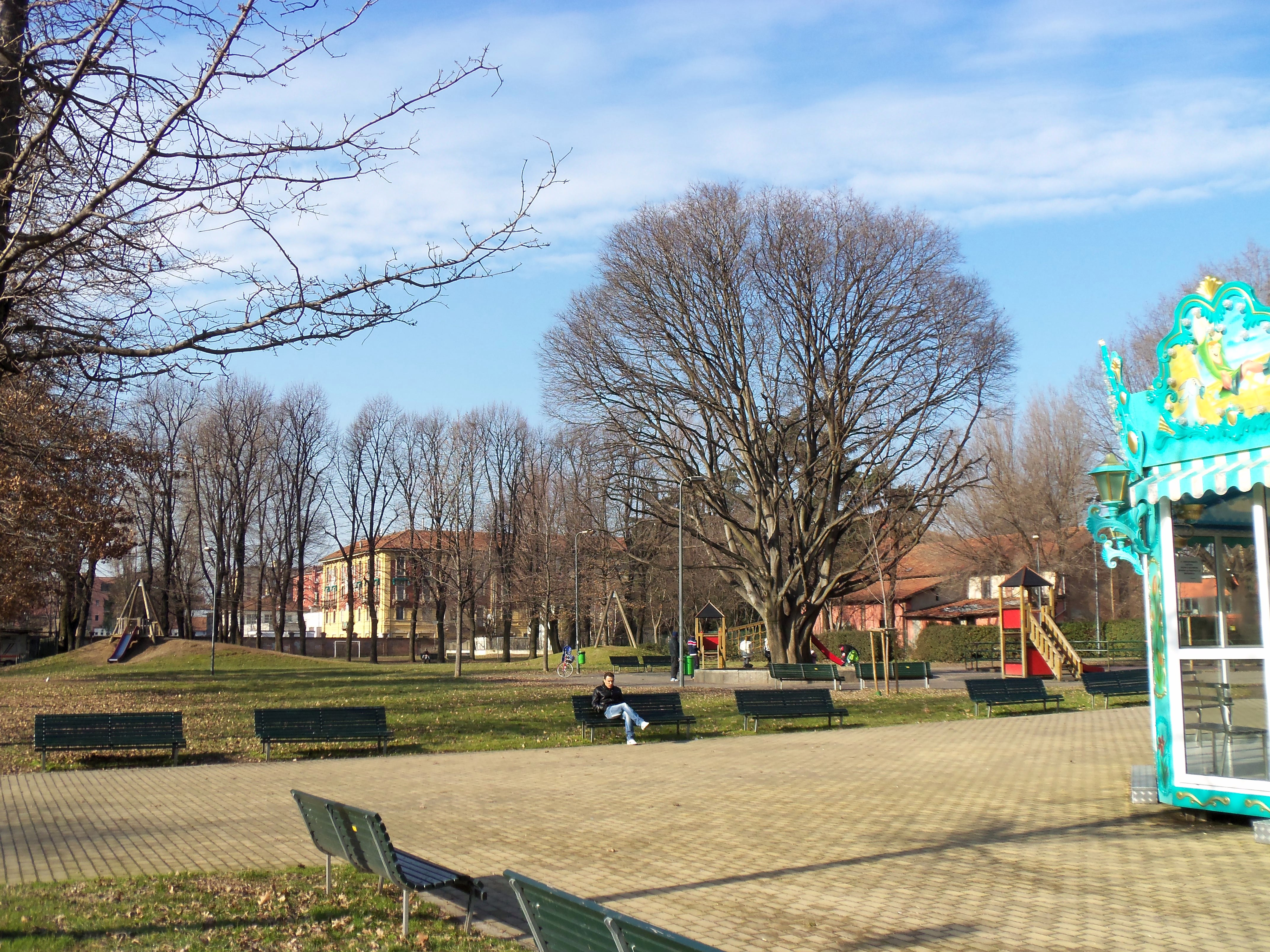 Milano, parco "Nicolò Savarino" (già "Agostino Bassi")